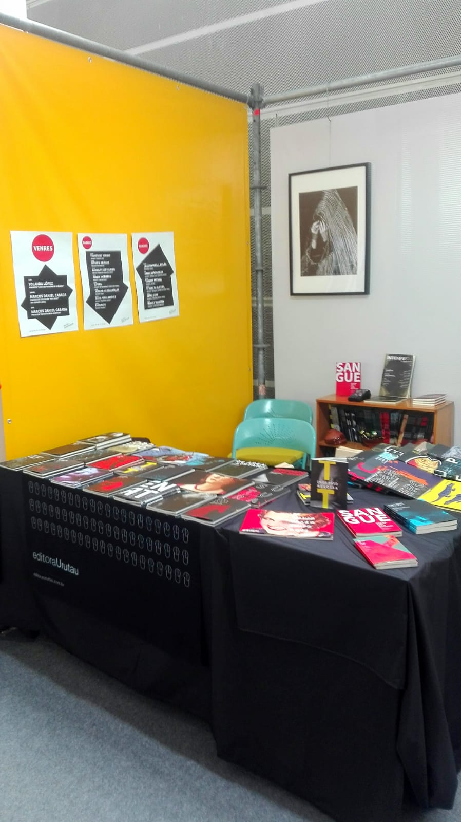 La editorial Urutau expone sus publicaciones en el Culturgal 2019, Galicia.